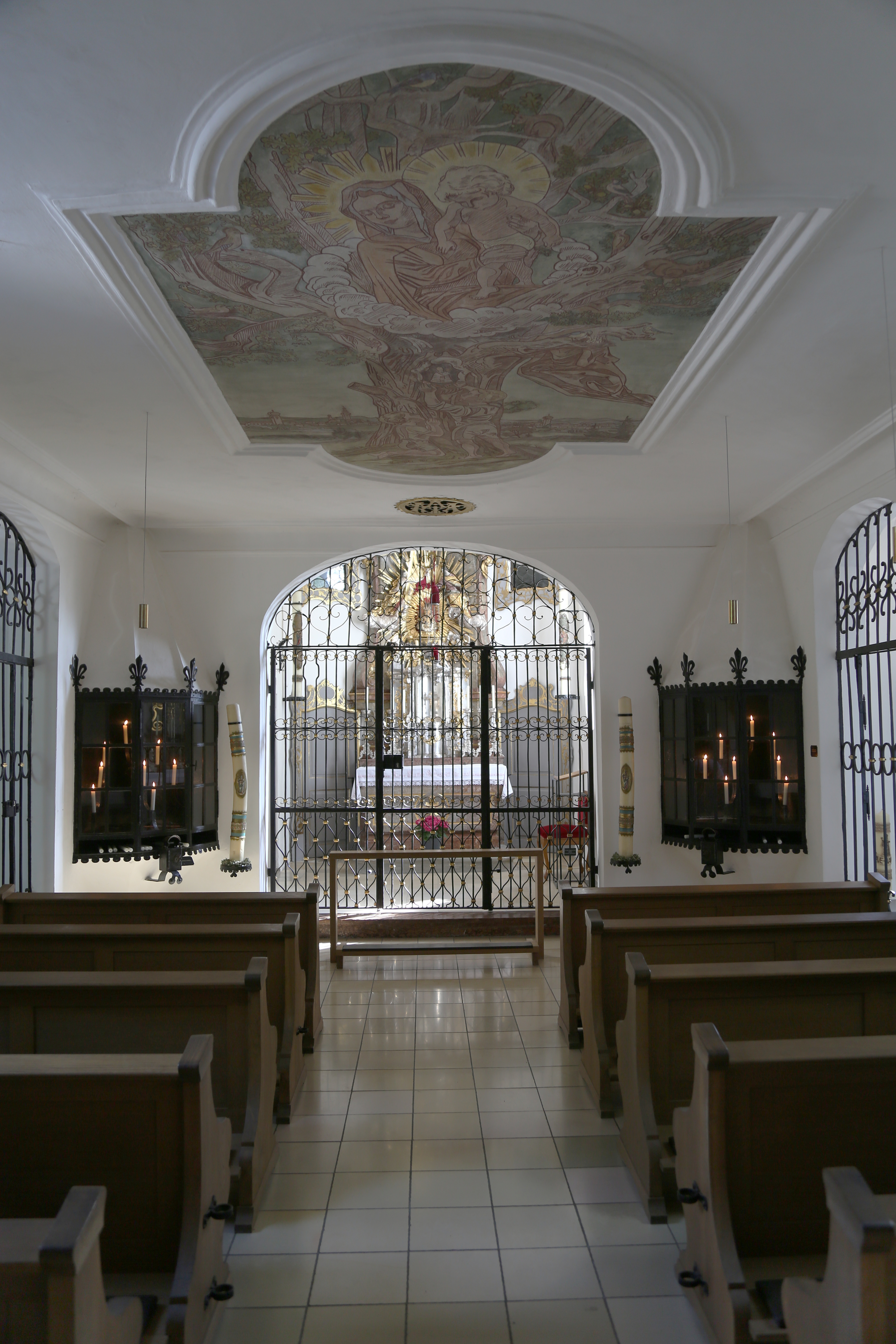 Maria Eich, bei Planegg, ist eine Wallfahrtskirche und ein Augustiner-Kloster. Die Gnadenkapelle